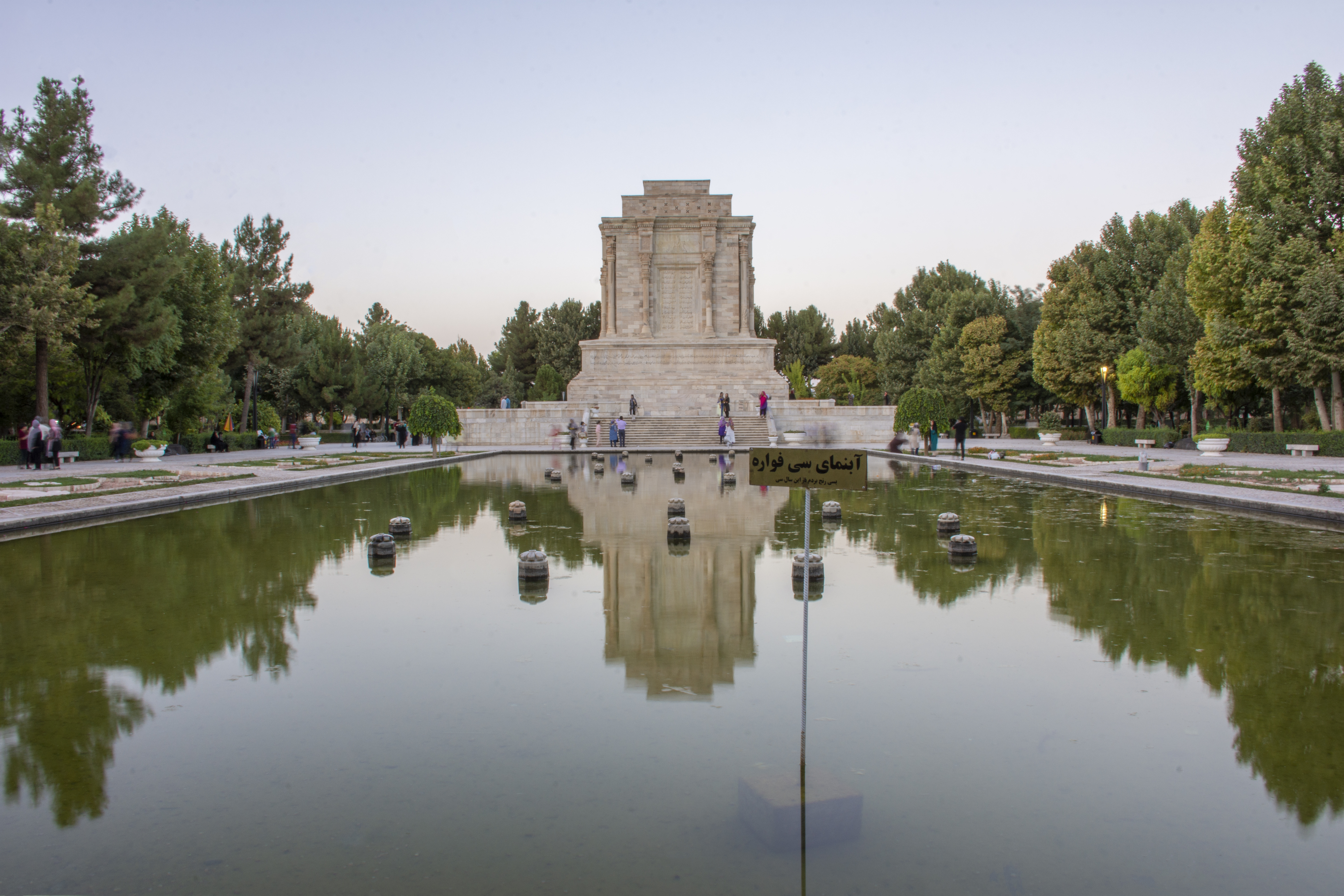 آرامگاه فردوسی